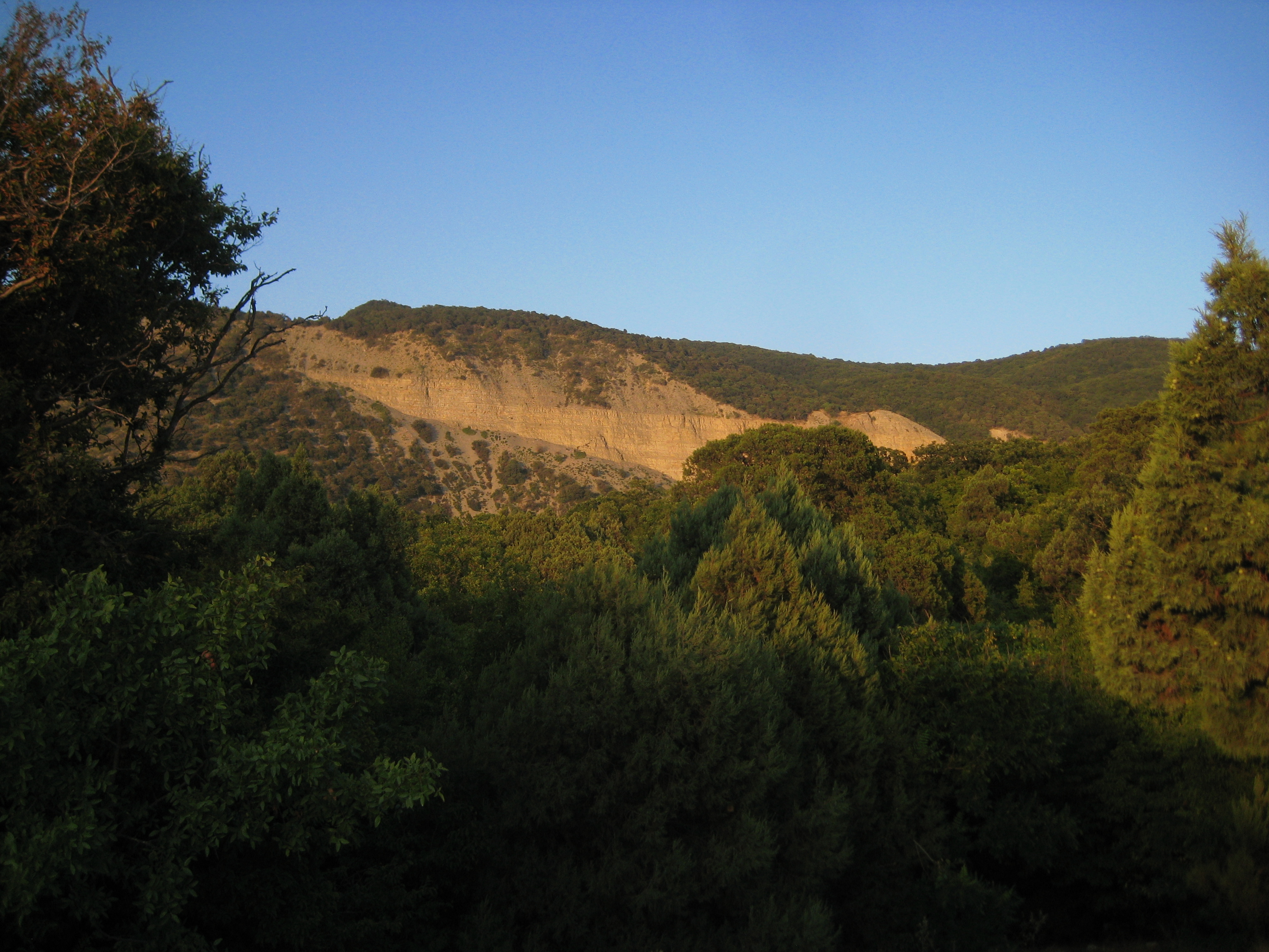 Большой Утриш